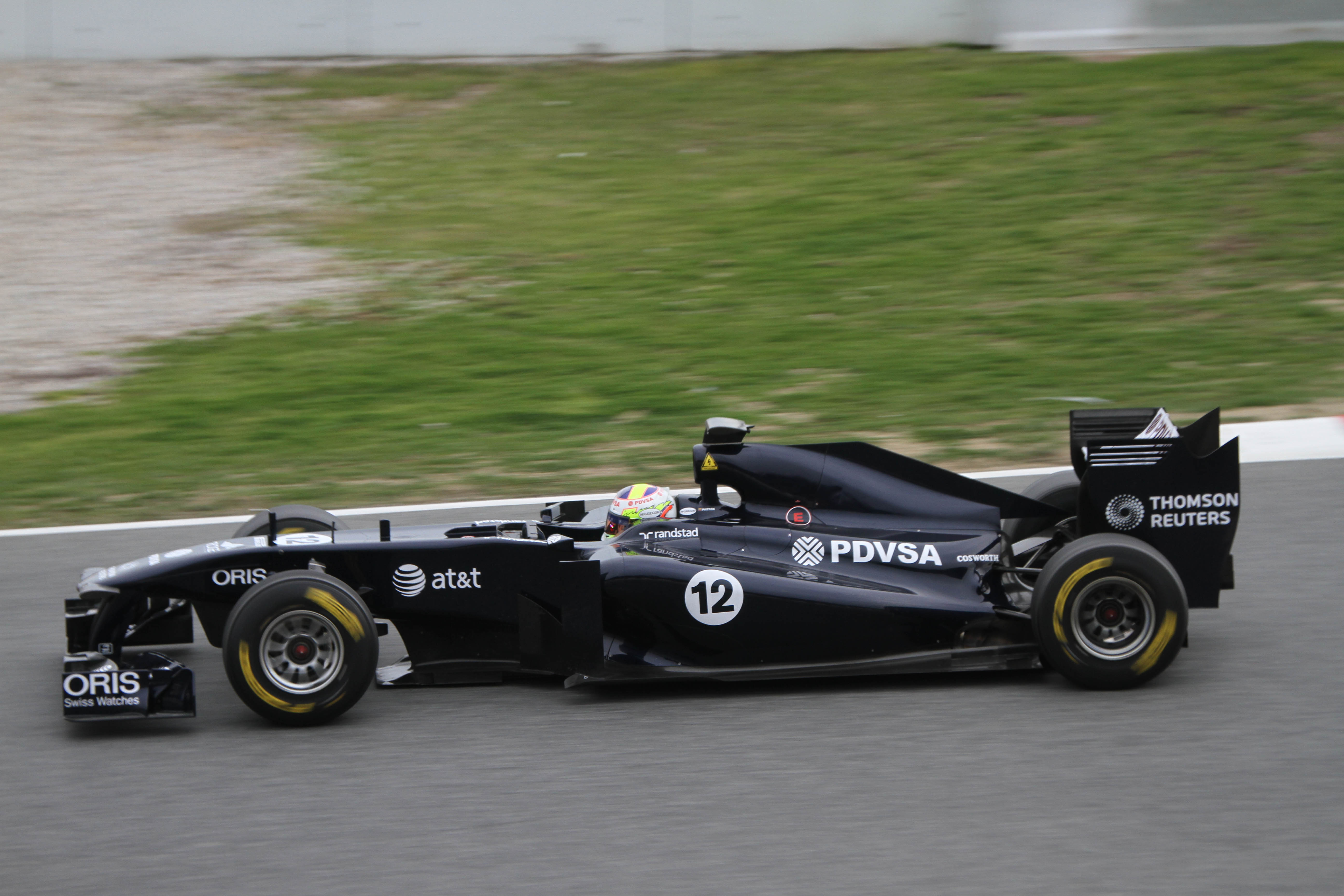 Pastor Maldonado